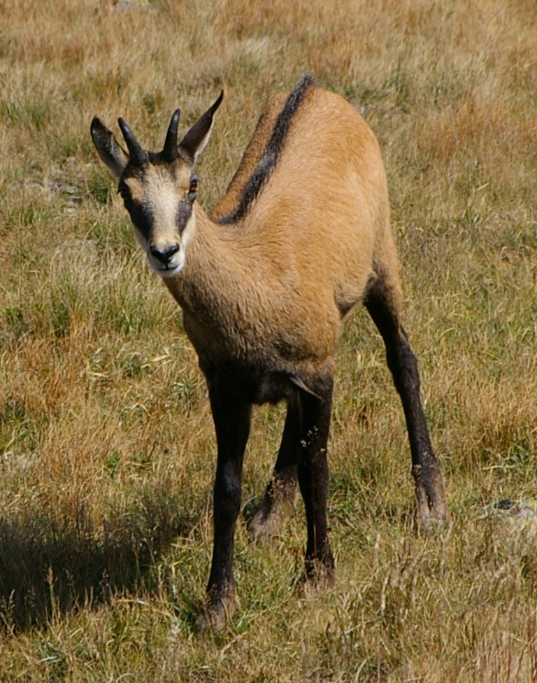 Rupicapra Rupicapra (not sure)